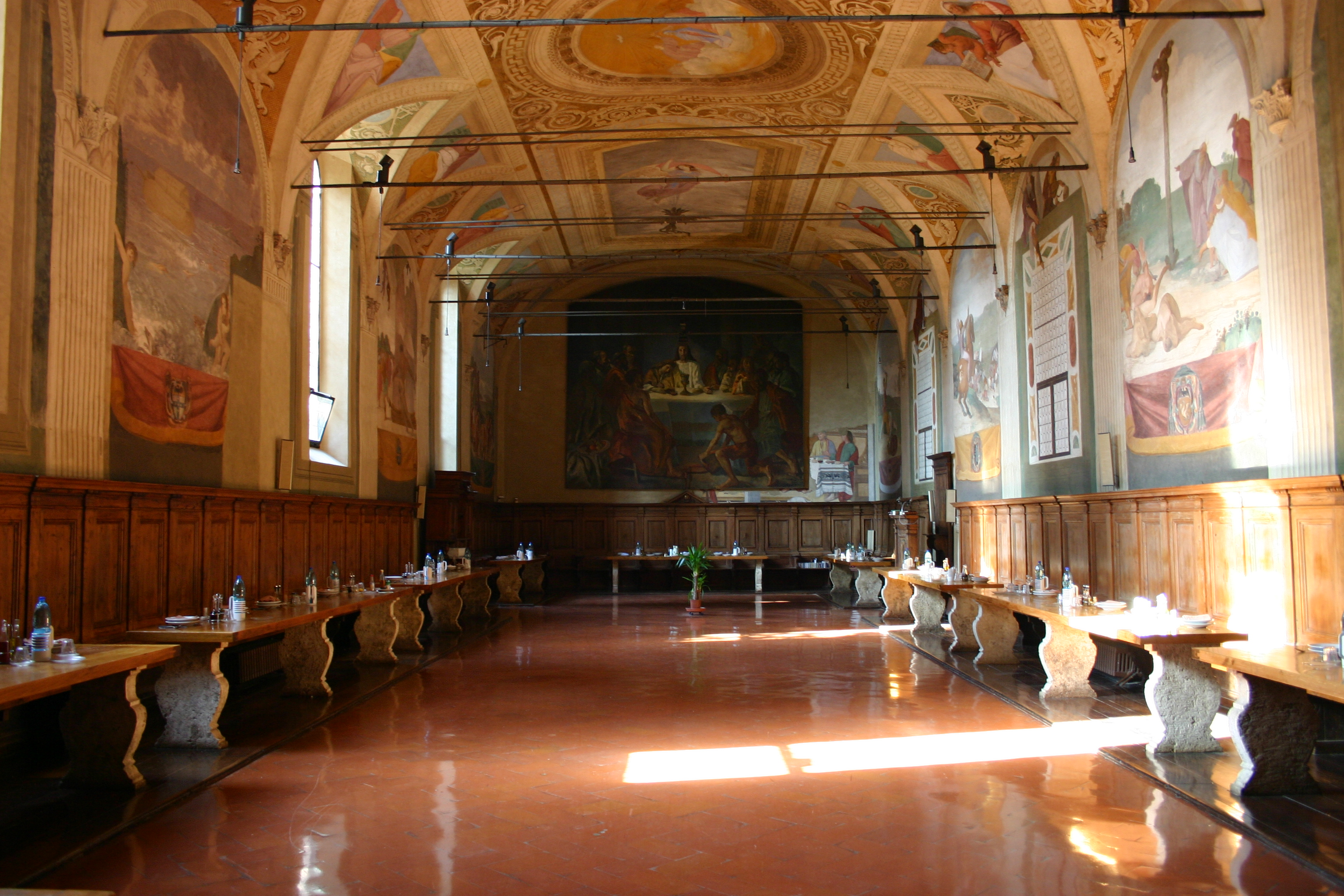 Abbazia territoriale di Monte Oliveto Maggiore - Refettorio.